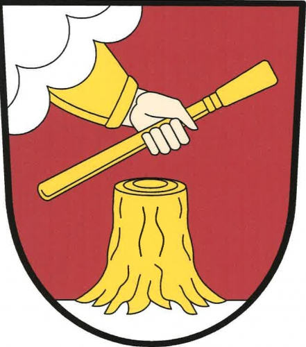 znak, Kmetiněves, okres Kladno